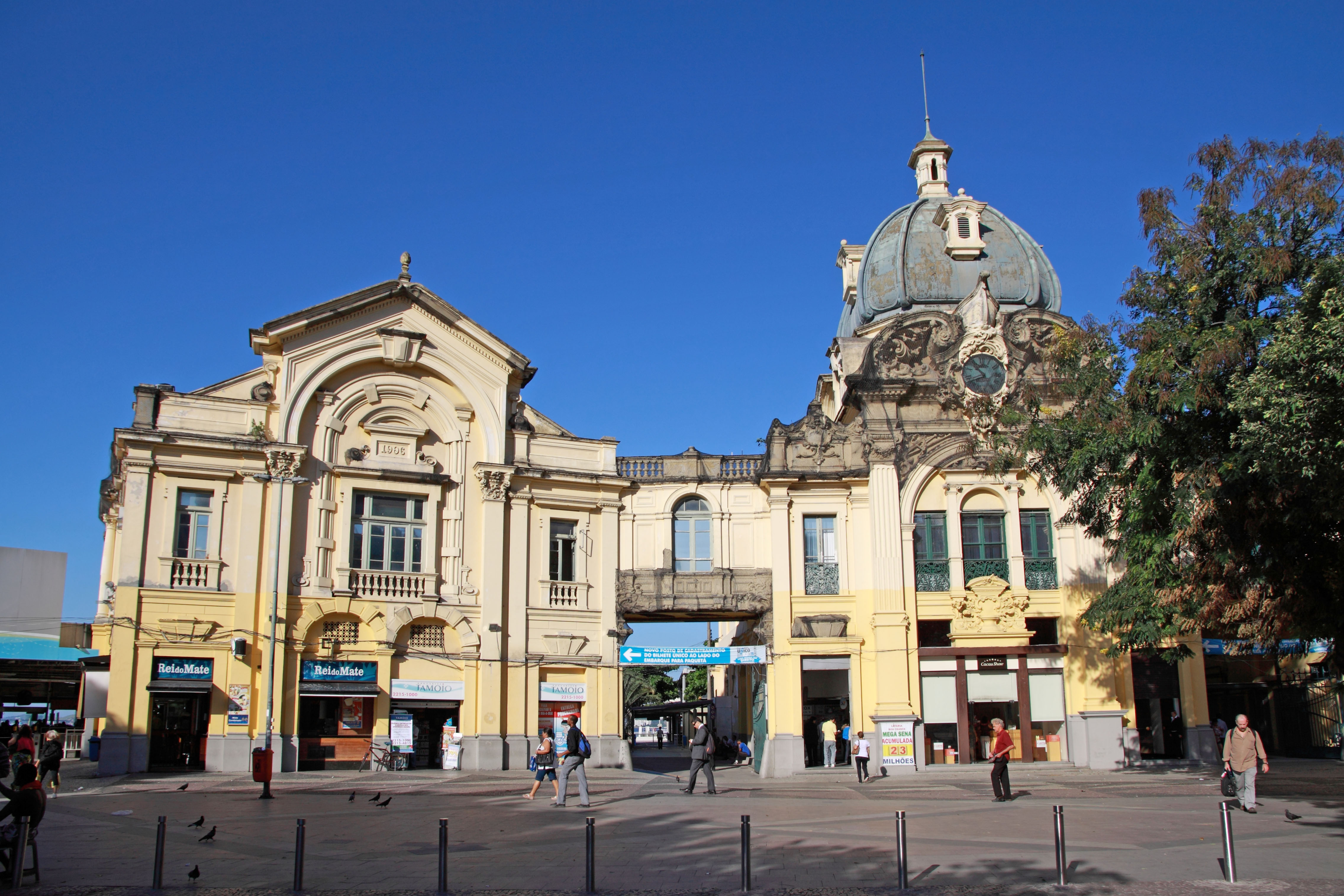 Estação das Barcas da Praça XV de Novembro, antiga estação da Companhia Cantareira.